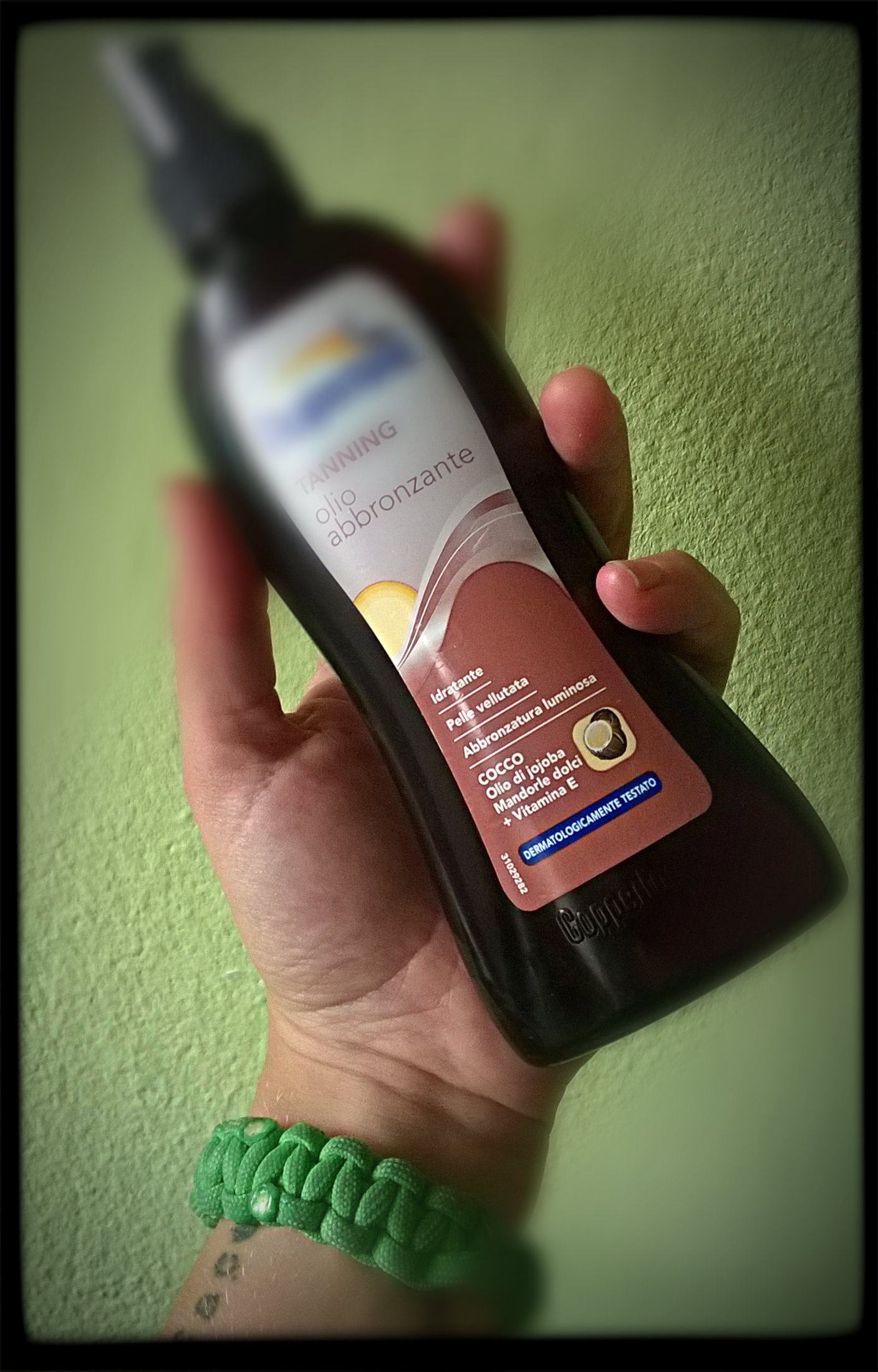 Veliko izdelkov za nego kože pred soncem vsebuje jojobino olje.